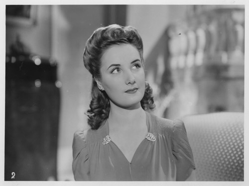 Fotografía blanco y negro, sobre papel fotográfico brillante, con marco perimetral blanco. Plano corto de la actriz Silvia Legrand, con el rostro de tres cuartos de perfil derecho. Película "El juego del amor y del azar".